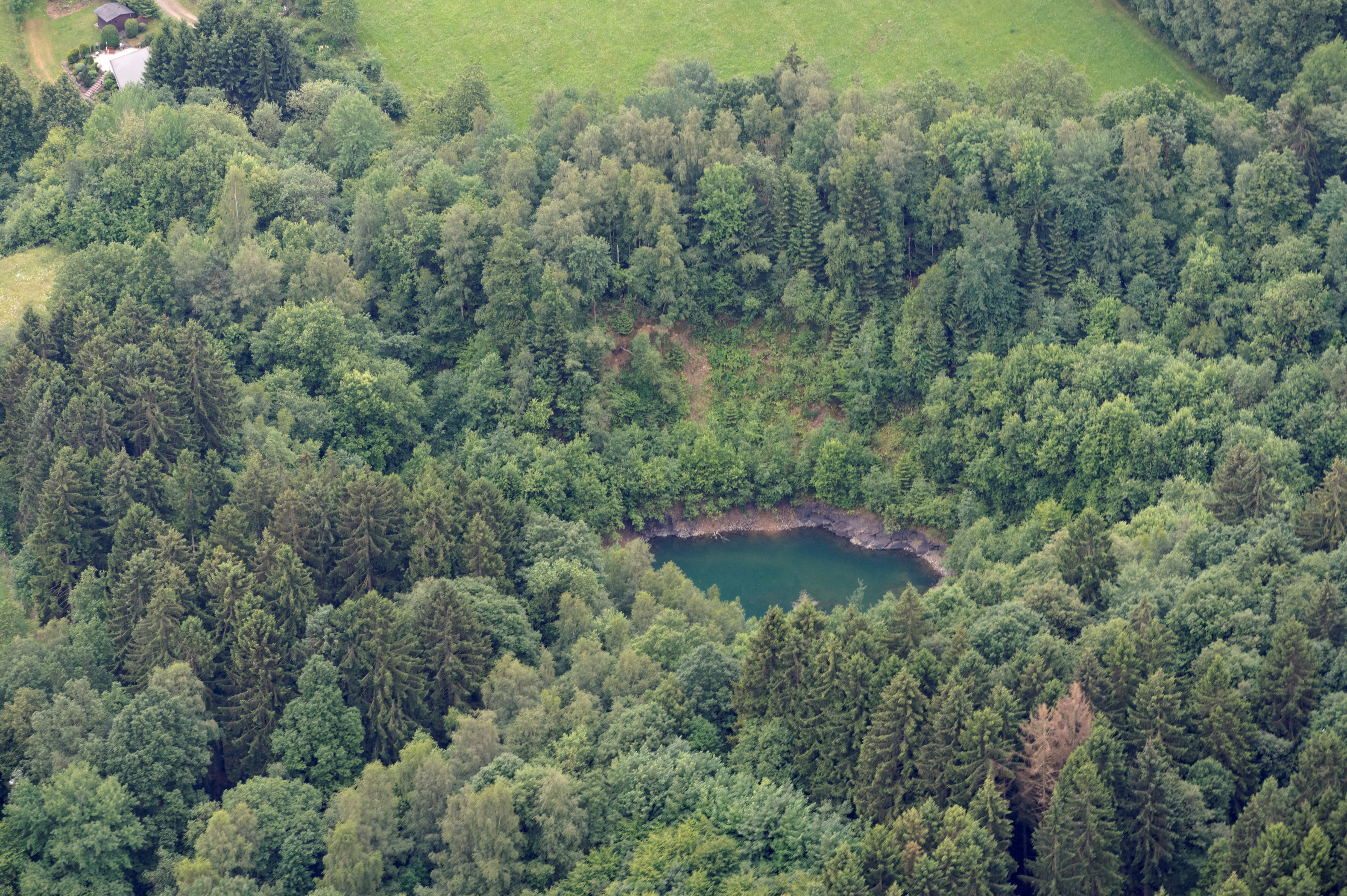 Fotoflug Sauerland Nord. Attendorn, Teich am Fuß des Hammerbergs bei Attendorn-Eichen mit Naturschutzgebiet Steinbruch Eichen, Blickrichtung West The making of this document was supported by the Community-Budget of Wikimedia Germany.